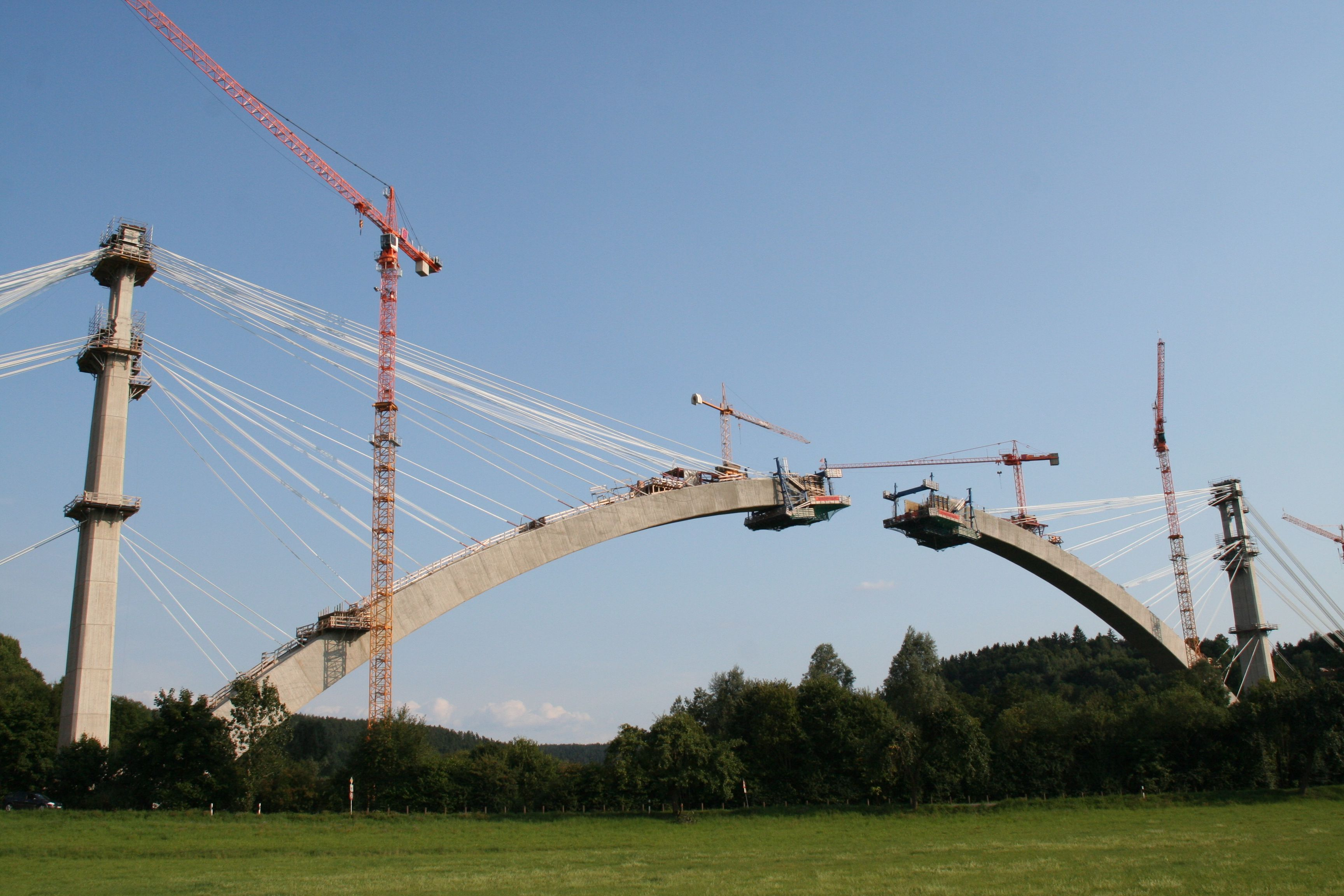 Talbrücke Froschgrundsee Landkreis Coburg, Blickrichtung Osten